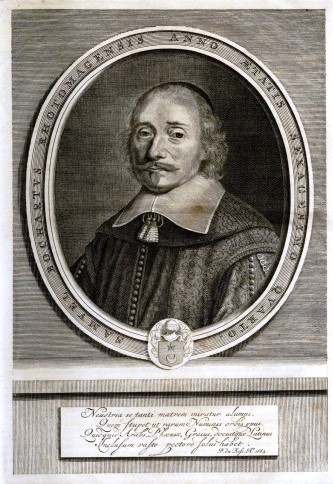 שמואל בוכהרט, פורטרט מתוך ספרו "Phaleg et Canaan" (גאוגרפיה של כנען)